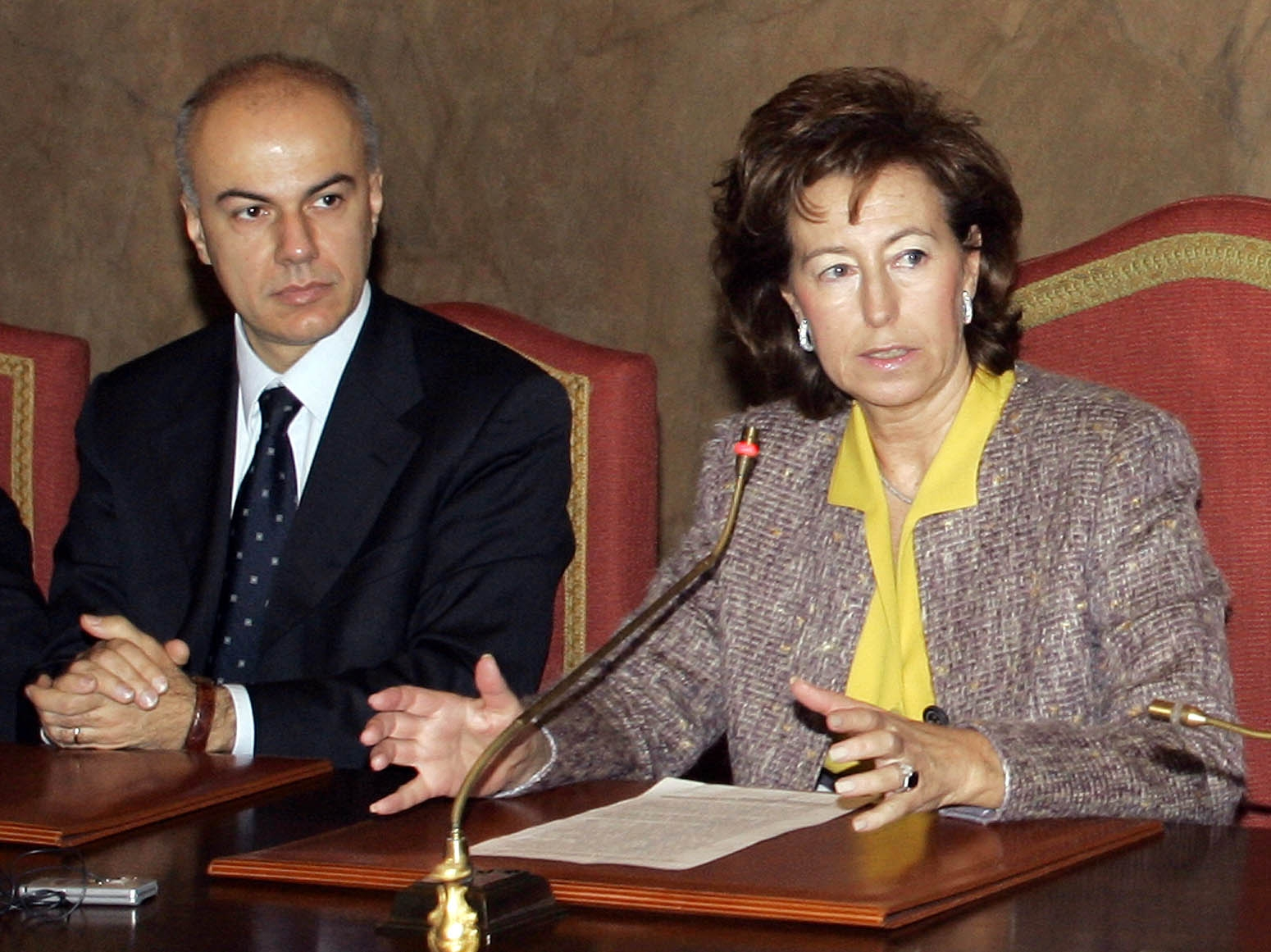 Letizia Moratti con l'assessore alla mobilità Edoardo Croci nel 2006.